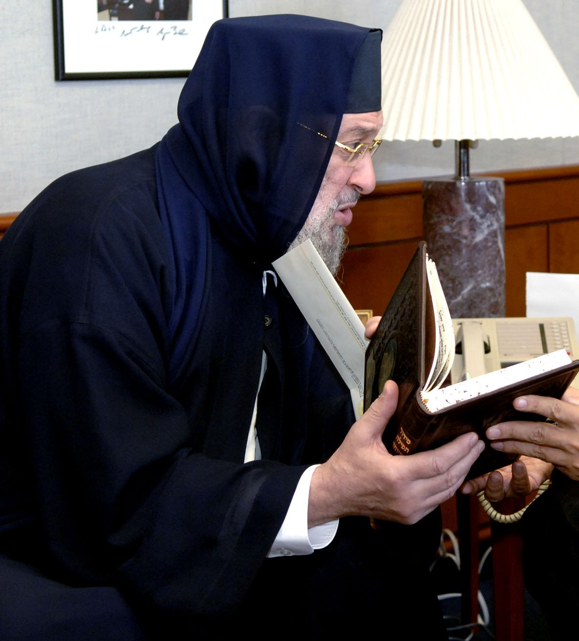 Baba Baruch